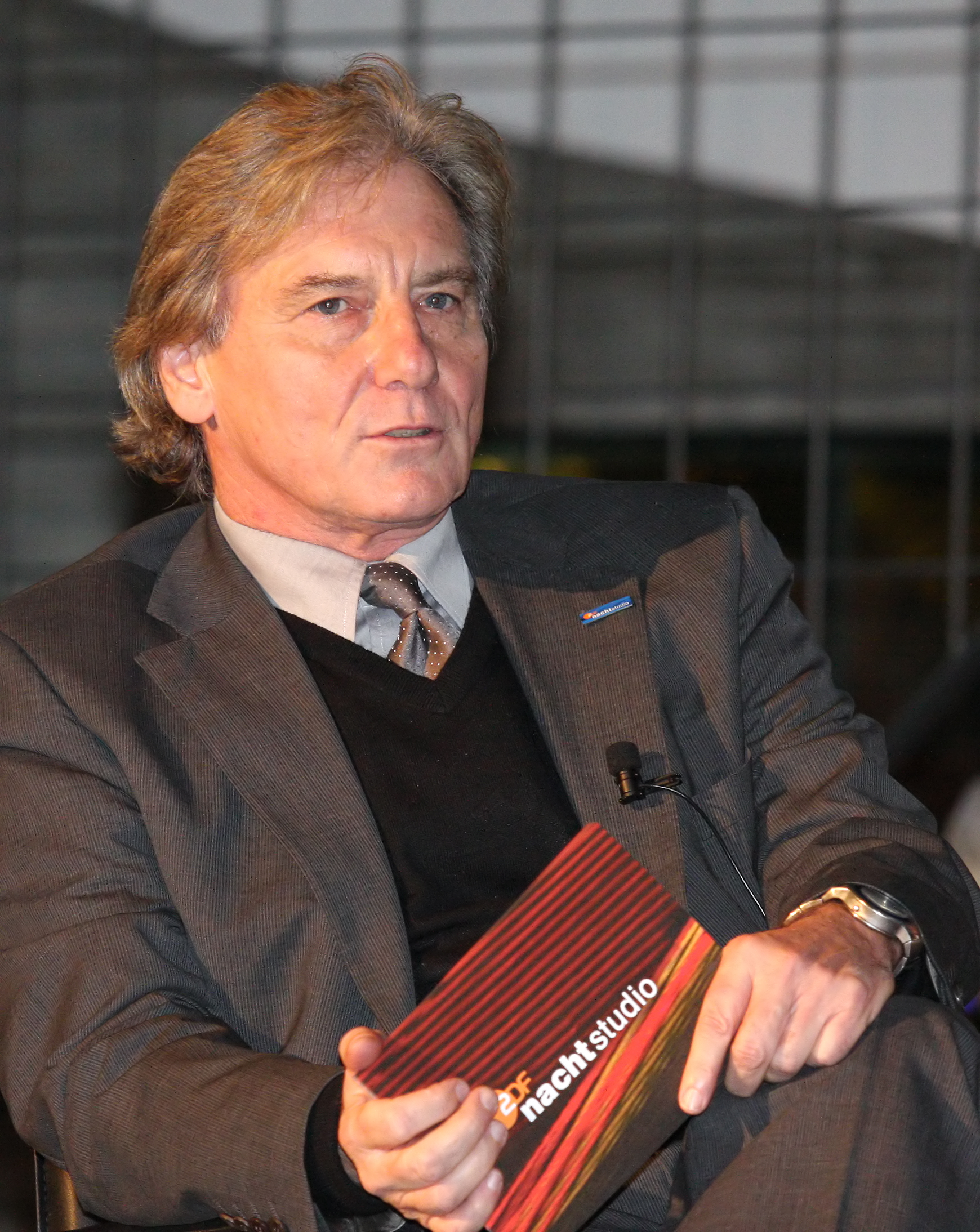 Volker Panzer, deutscher Journalist, Podiumsdiskussion zum Thema „Evolution des Wissens“ anlässlich der Verleihung der Zedler-Medaille 2009 im Senckenberg-Museum in Frankfurt am Main.